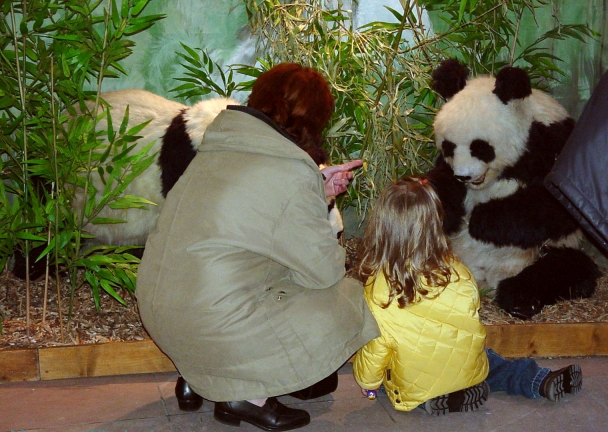 Museum fg03